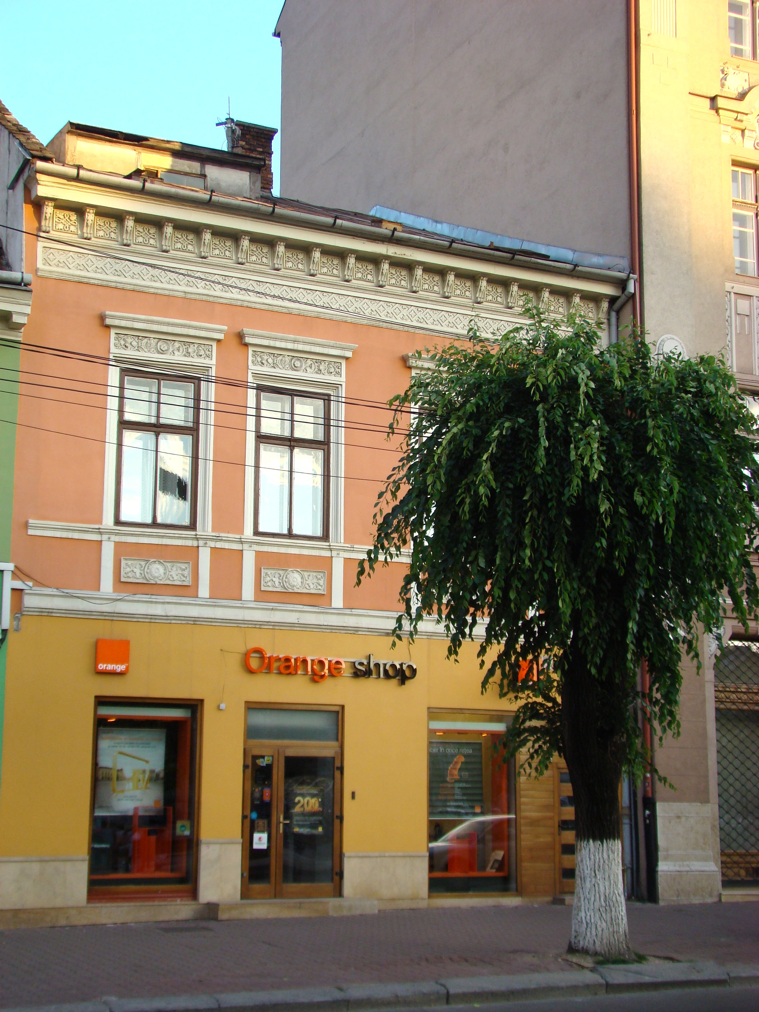 Clădire monument istoric, Piața Unirii Nr.6